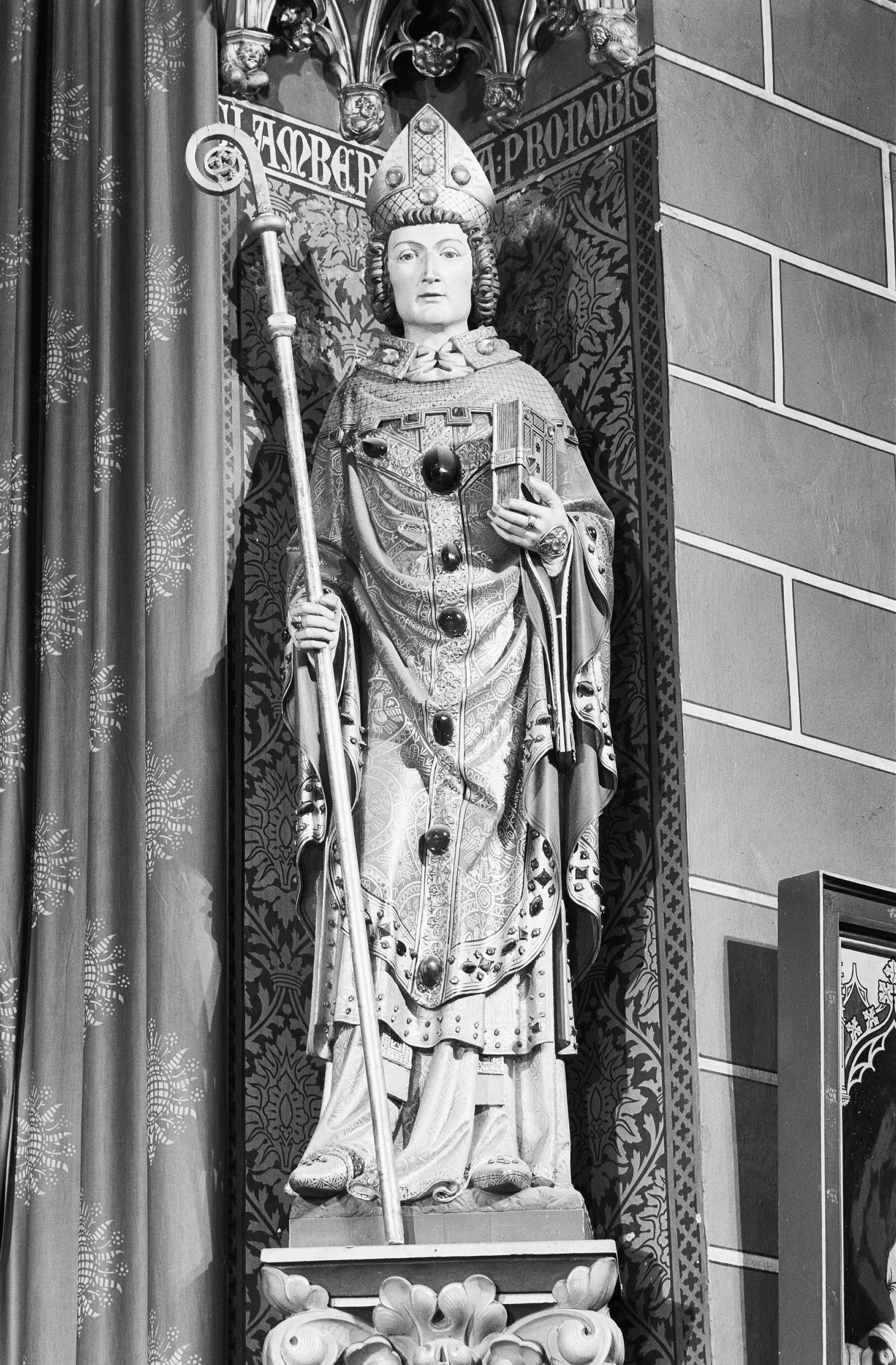 Sint-Servaaskerk: beeld van Sint-Lambertus.